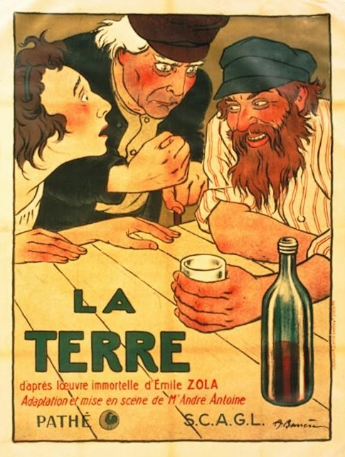 Affiche de La Terre film d'André Antoine (1921)